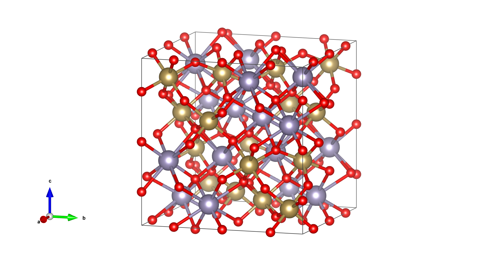 Kristallstuktur von Oxystannomikrolith als "Ball-and-stick-Modell". Erstellt mithilfe des freien Strukturprogramms VESTA und den CIF-Daten von Madeleine Gasperin Farblegende: Tantal: gelbbraun; Zinn: lila; Sauerstoff: rot.